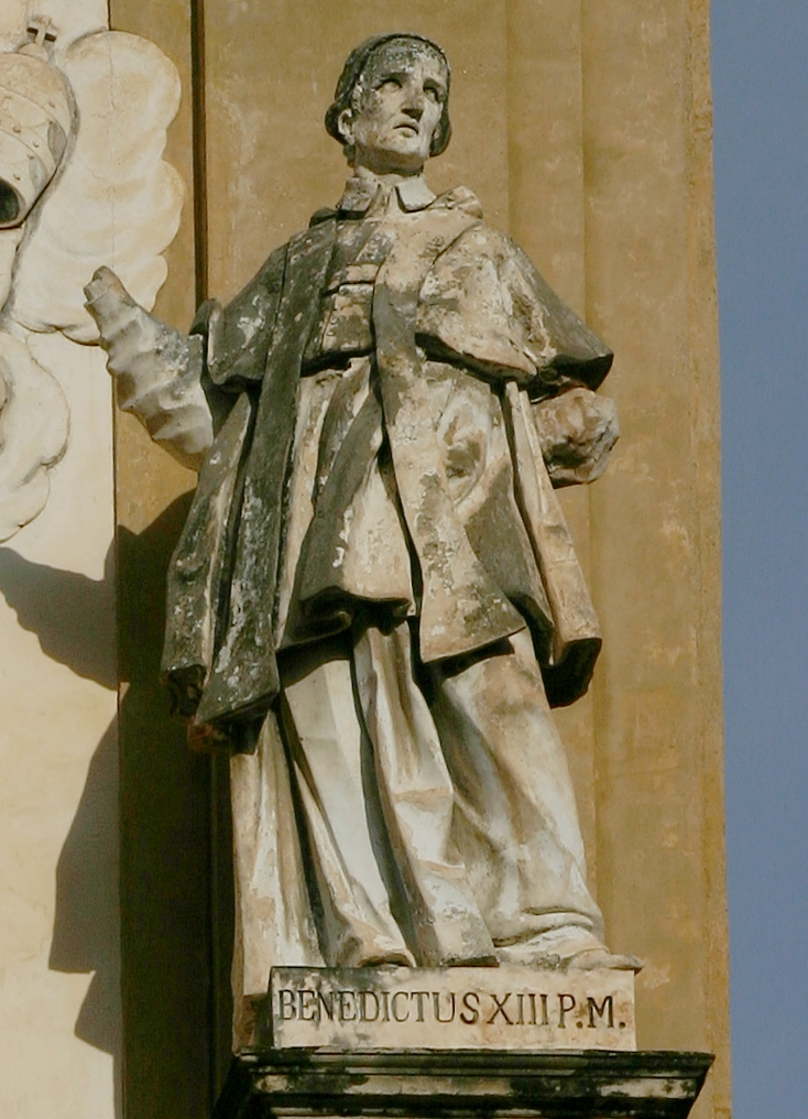 San Domenico - Palermo